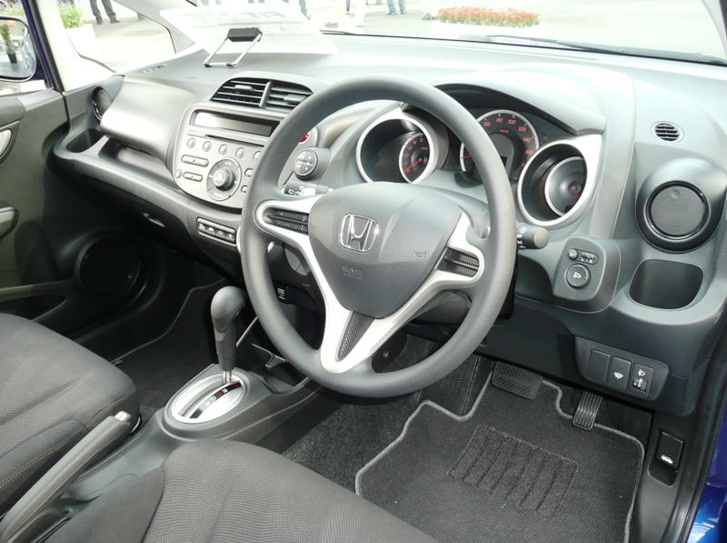 Honda Fit interior.